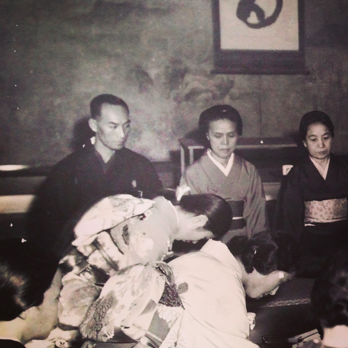 志野流香道家元 19世幽求斎宗由